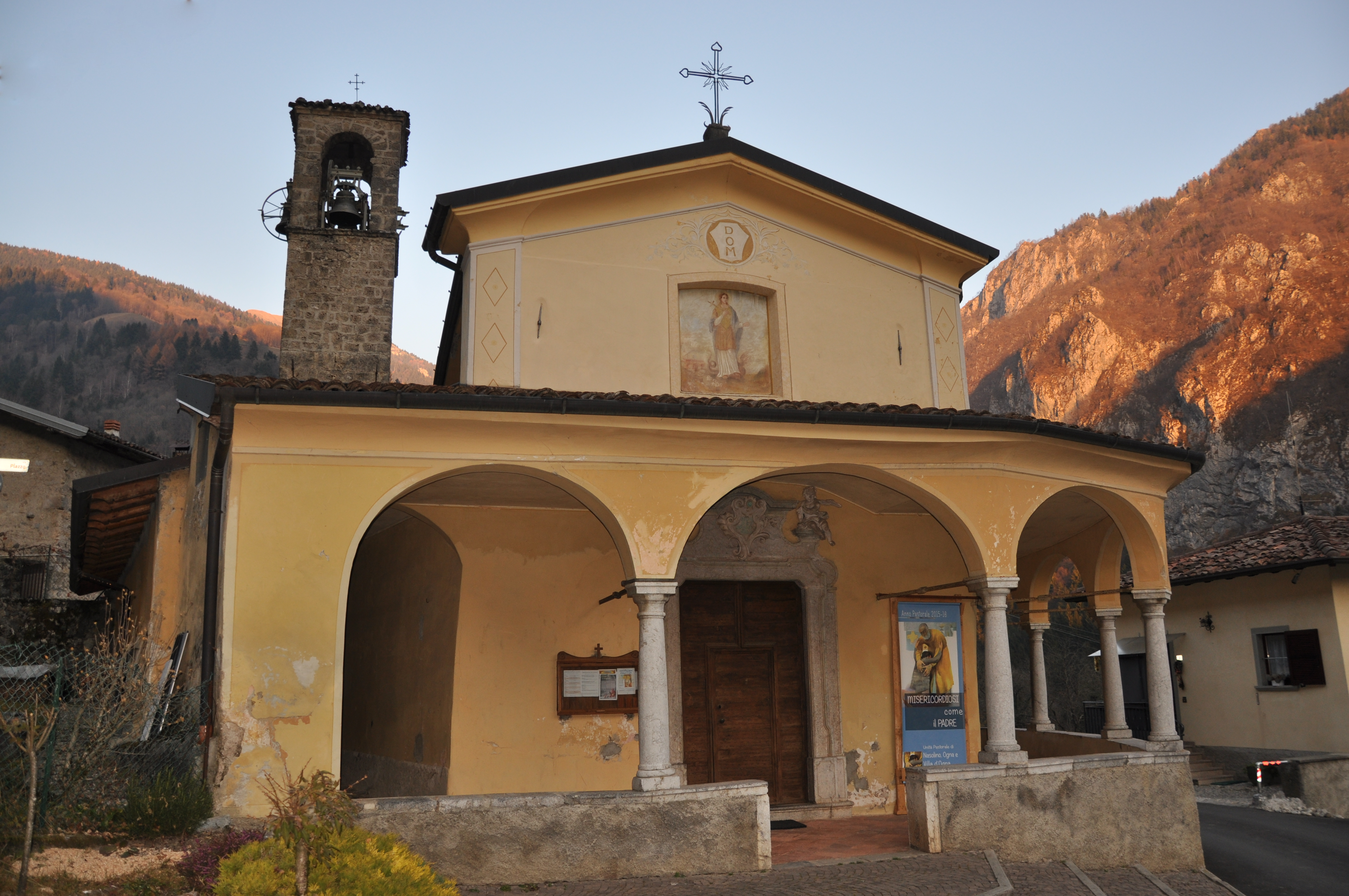 Facciata della chiesa parrocchiale di Santa Margherita in Valzurio (Oltressenda Alta - BG)